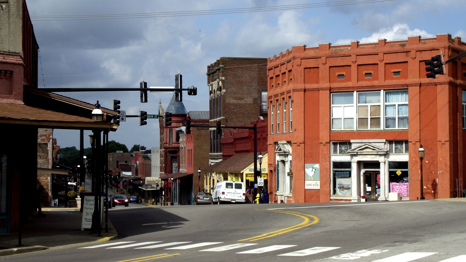 Looking down Main Street, Van Buren, AR